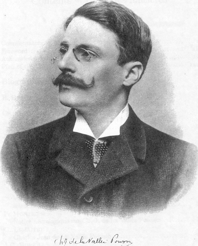 Charles-Jean de La Vallée Poussin, Belgian mathematician